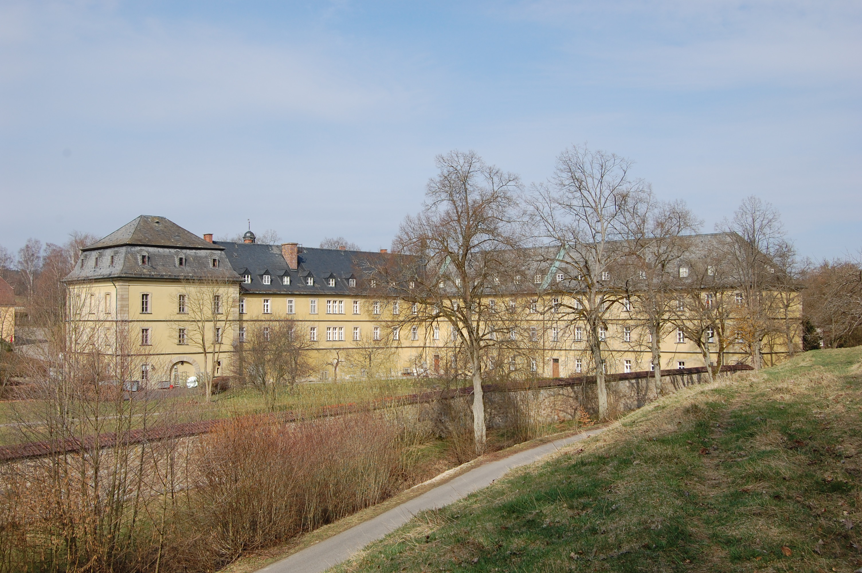 Maria Bildhausen (2011)